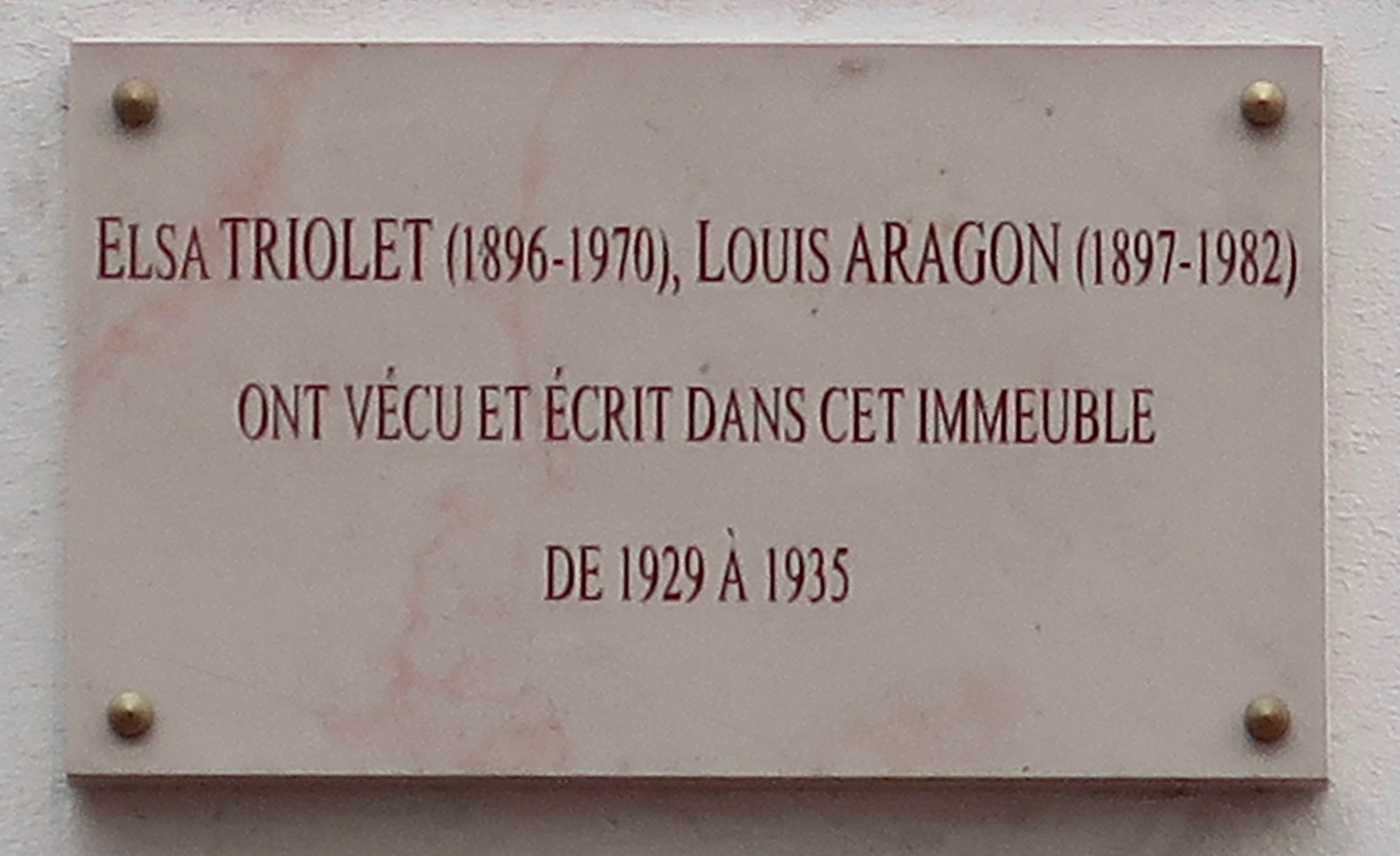 Plaque en hommage à Elsa Triolet et Louis Aragon, 5 rue Campagne-Première (Paris 14e).